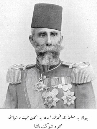 Mahmut Şevket Paşa